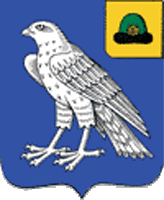 Герб Сапожковского района Рязанской области